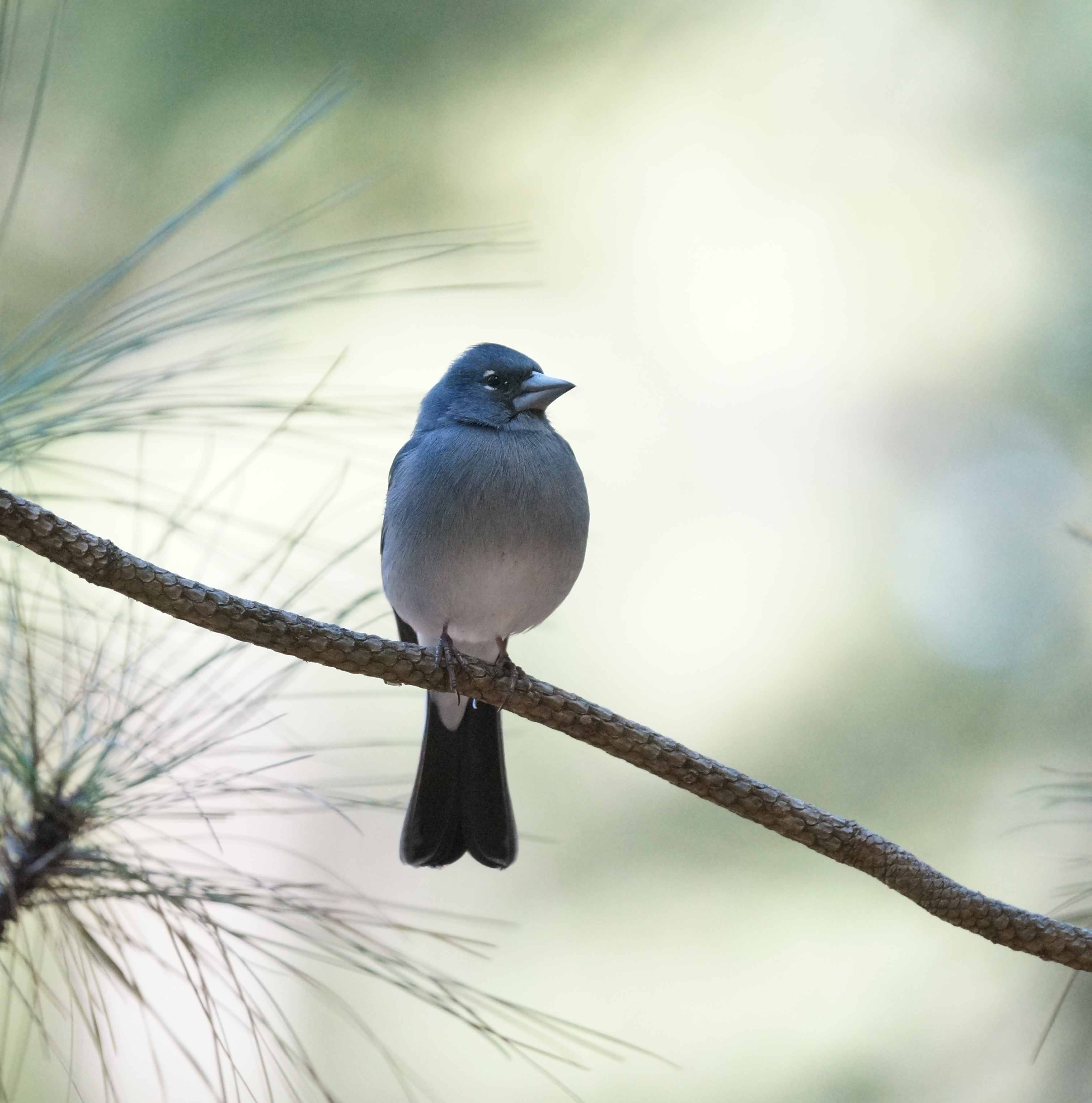 Ein Teydefink Männchen